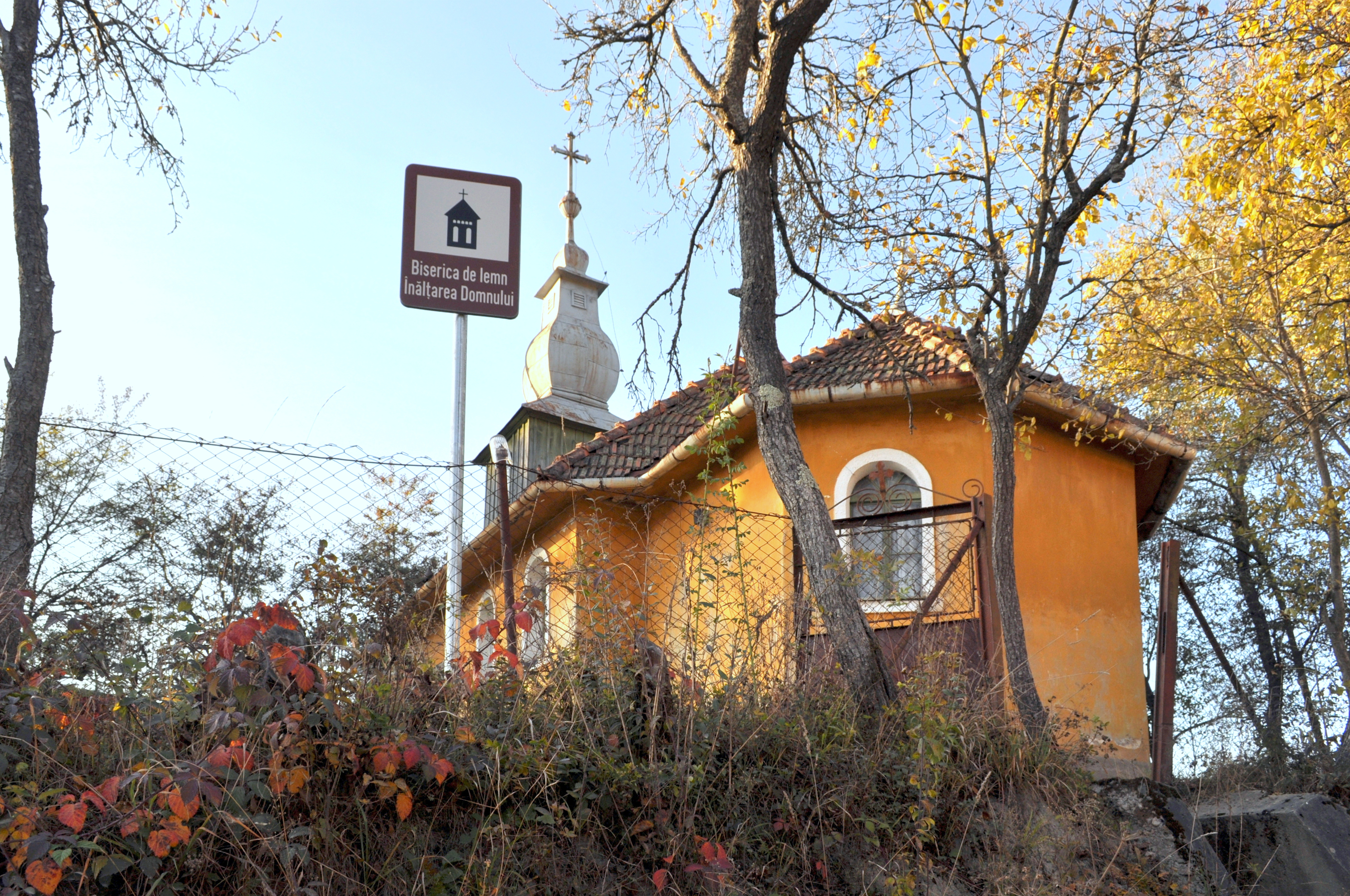 Biserica de lemn "Înălţarea Domnului" din Groși, județul Arad